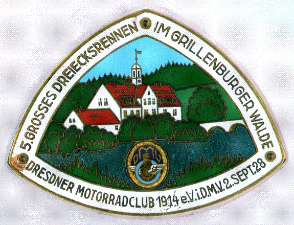 Foto Plakette Motorradrennen Grillenburg 1928